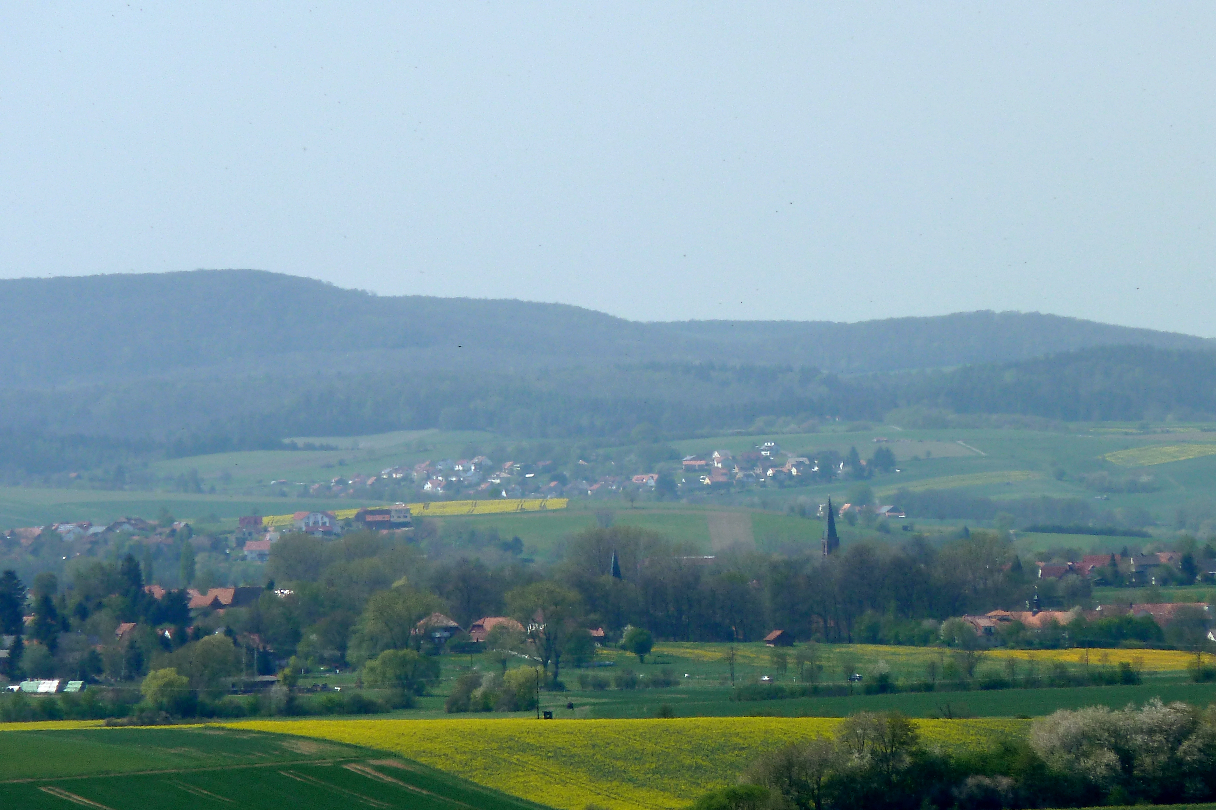 Blick vom Mittelberg bei Obernfeld (Hellberge) nach Westen über das Seeburger Becken; sichtbar sind Germershausen, Bernshausen, ein kleiner Teil von Seeburg, der Steinberg, ein Teil von Ebergötzen und im Hintergrund der Plessforst (Büsteppe, Hünstollen)